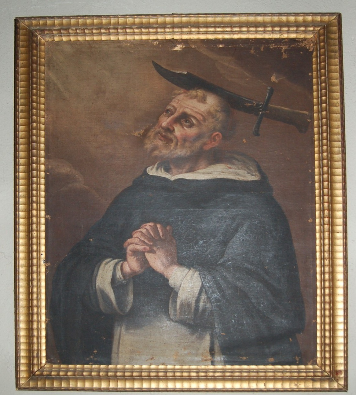 Quadro di San Pietro Martire - Chiesa di Sa Pietro Martire in Baruffini - Tirano - Sondrio